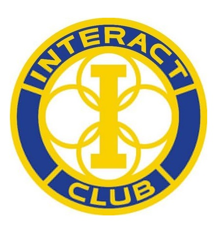 interact